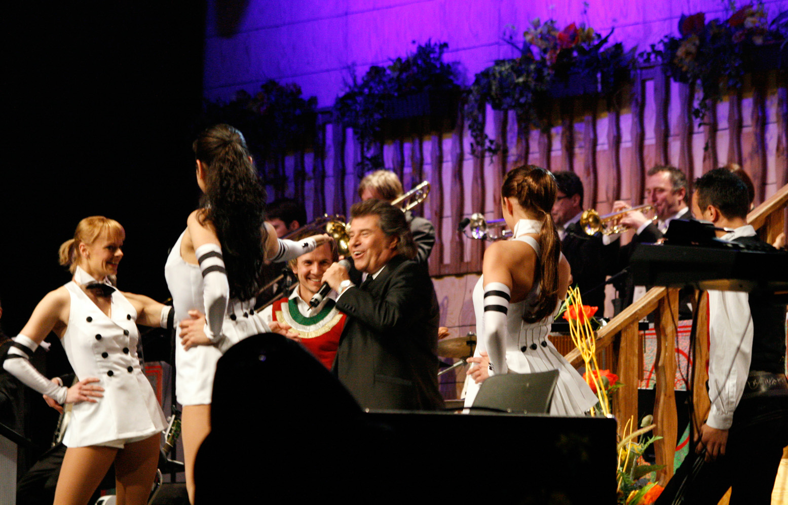 Andy Borg mit der Musikantenstadl-Tournee in der Wiener Stadthalle.